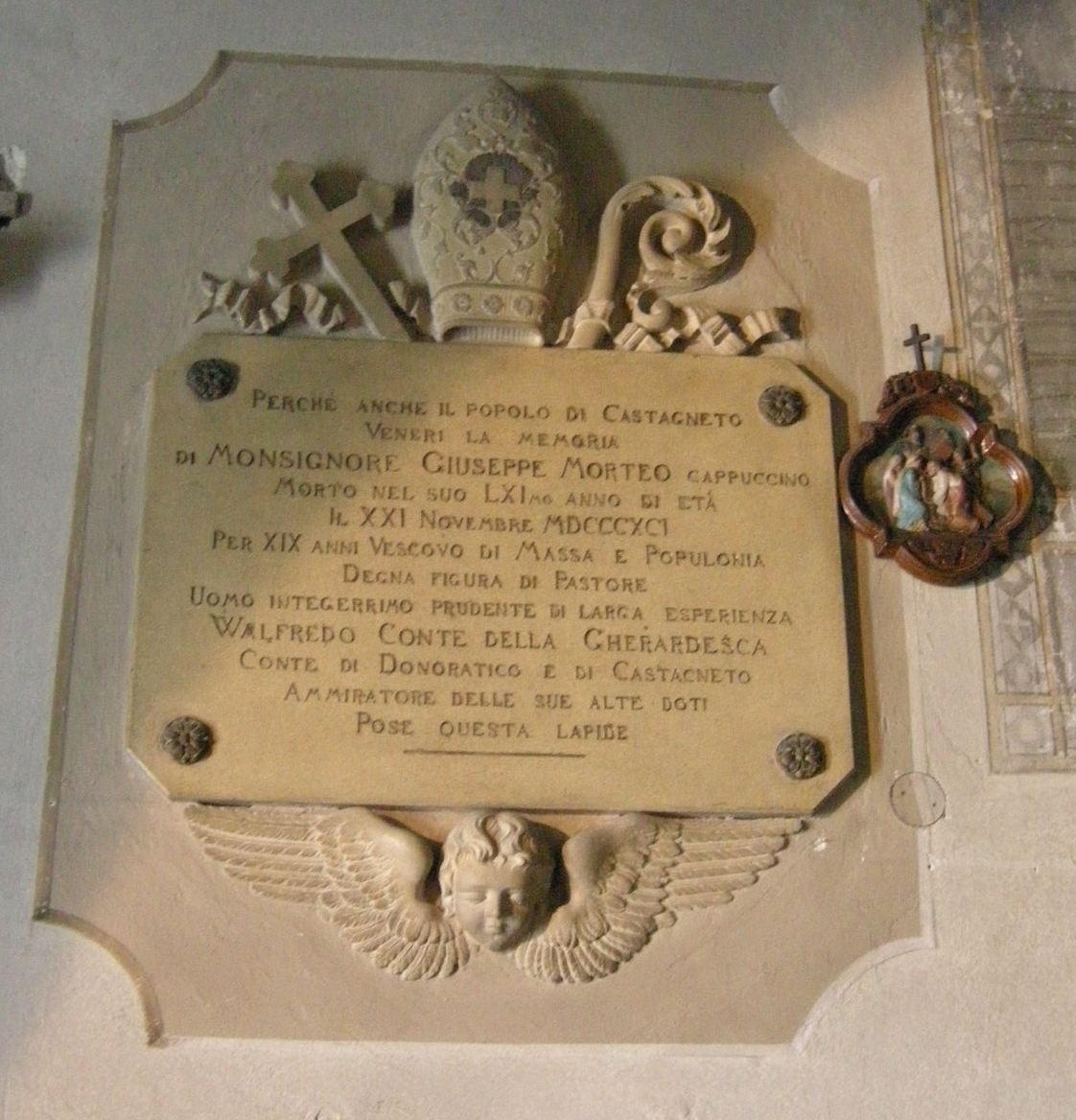 Propositura di San Lorenzo (Castagneto Carducci), interno 05 targa vescovo giuseppe morteo